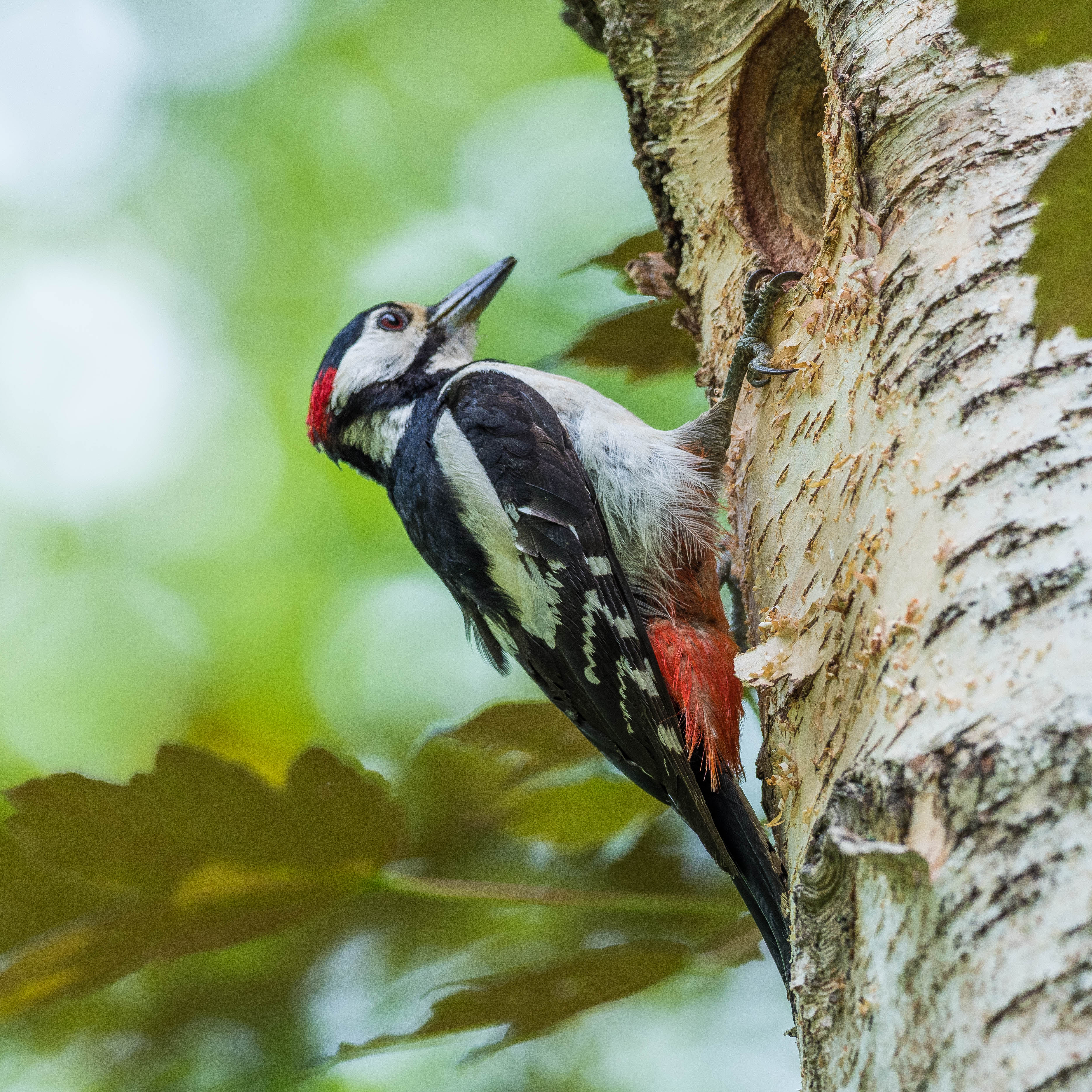 Dendrocopos major major male, Isbladskärret, Stockholm, Sweden